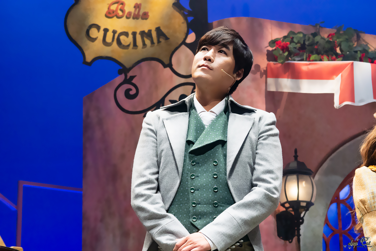 너를위한글자 정상윤